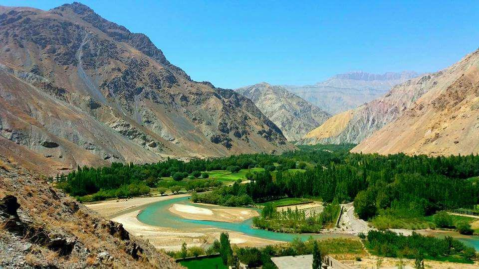 تصویری ولسوالی بلخاب ولایت سرپل